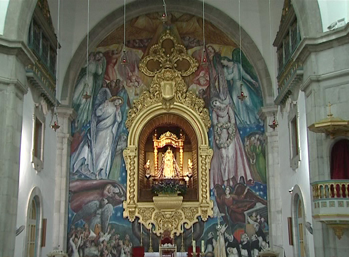 Interior y nave principal de la basílica de N.S. de la Candelaria